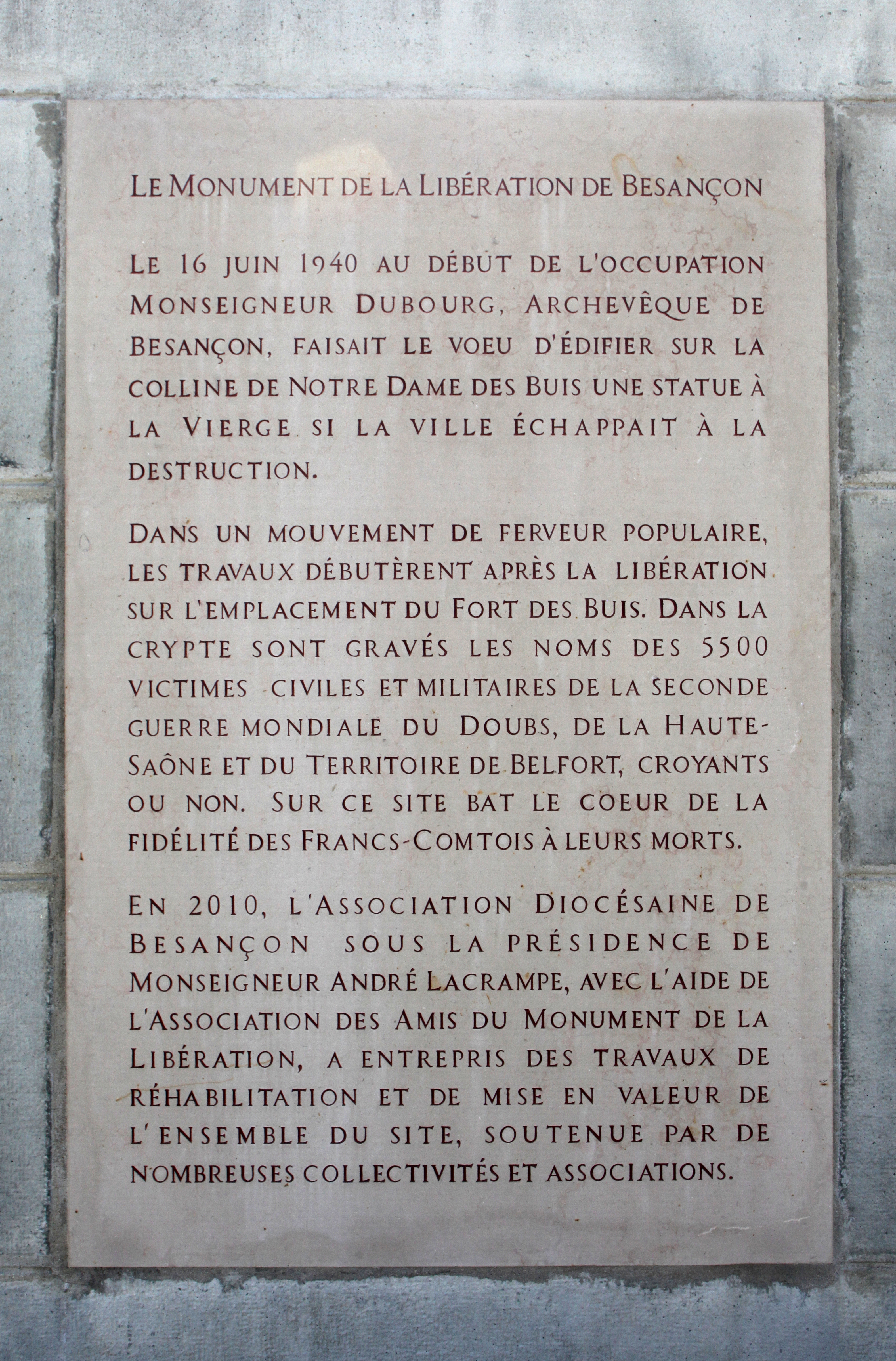 Plaque à Notre-Dame de la Libération.